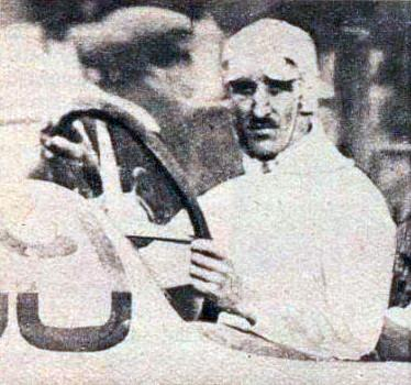 Christian Werner, vainqueur de la Targa Florio en 1924.